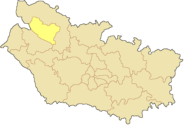 Canton d'Abbeville-1 dans le département de la Somme